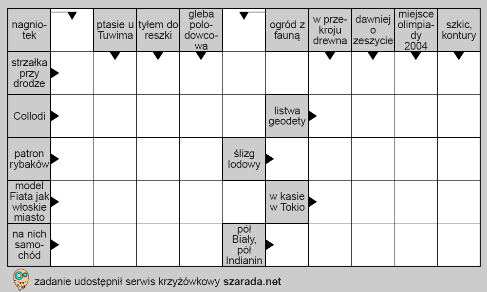 Krzyżówka panoramiczna, udostępniona dla na licencji CC przez serwis